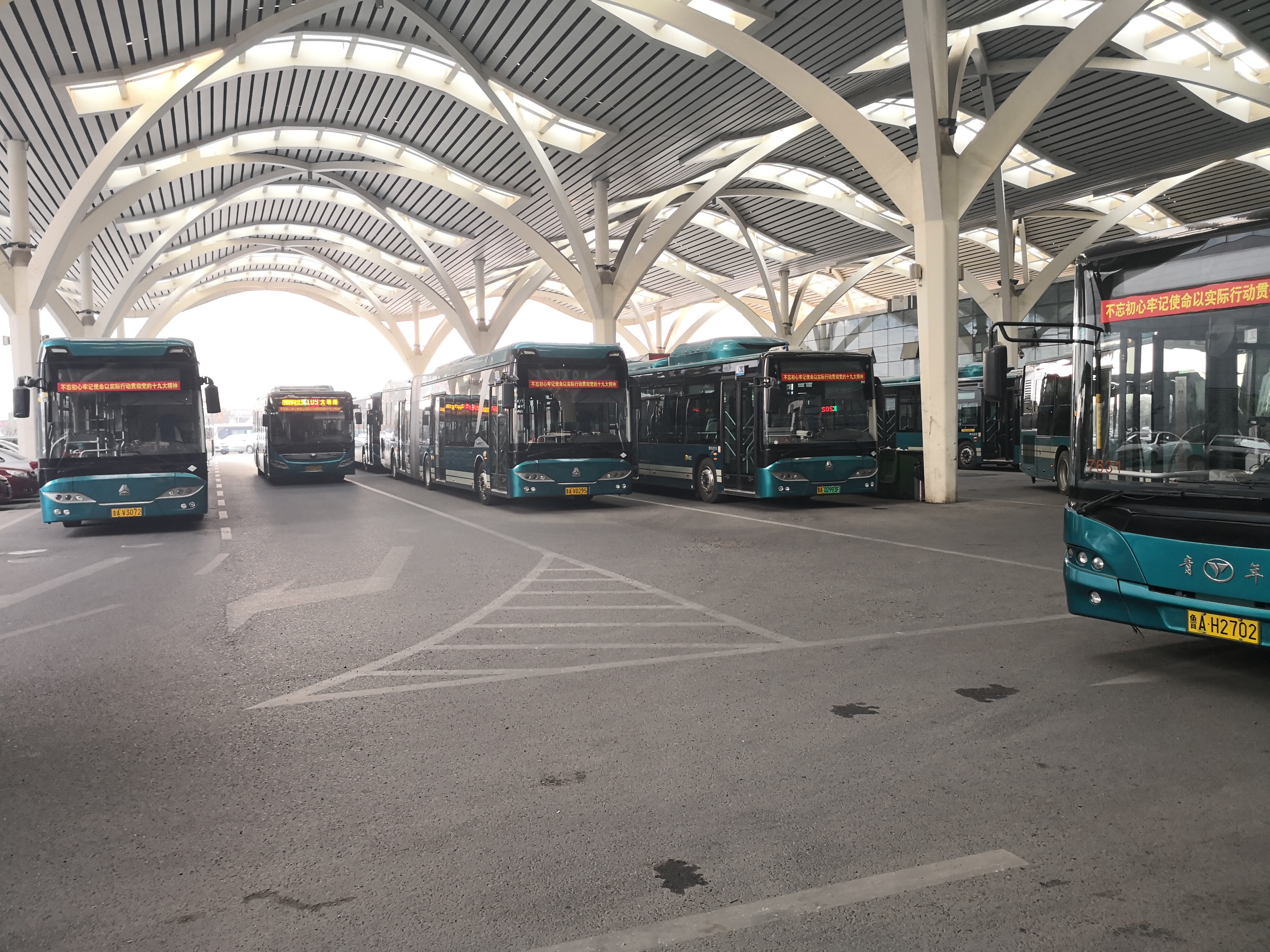 济南西站公交枢纽